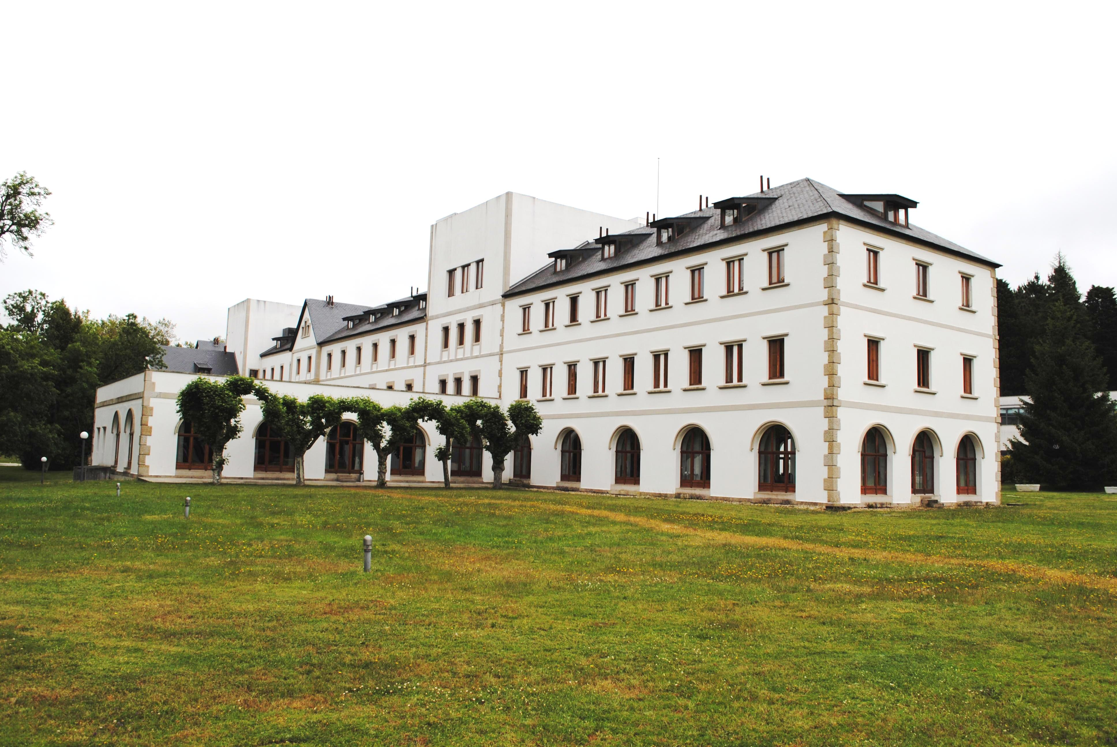 Vexa o título e as categorías.